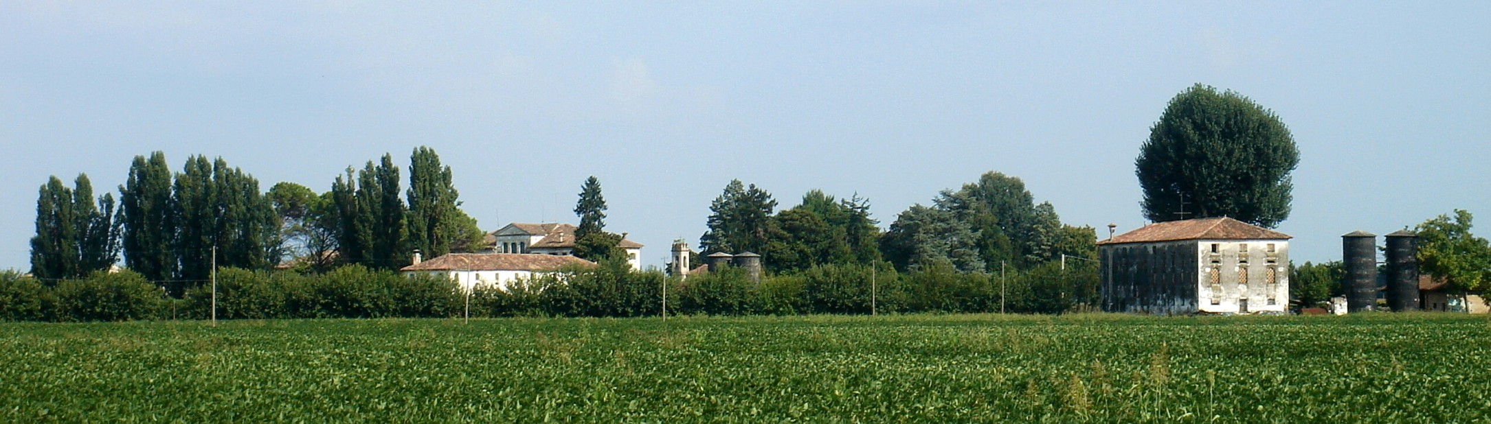 Mareno di Piave (Treviso): Villa Montalbano Balbi Valier Paoletti (XVII secolo), il complesso e il parco visti delle sponde del fiume Monticano.